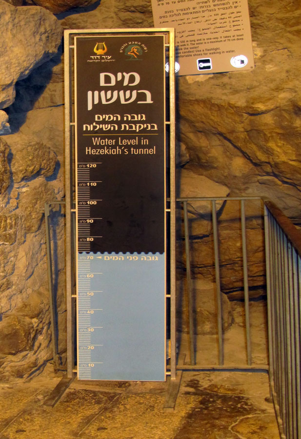 Hezekiah's Tunnel נקבת השילוח